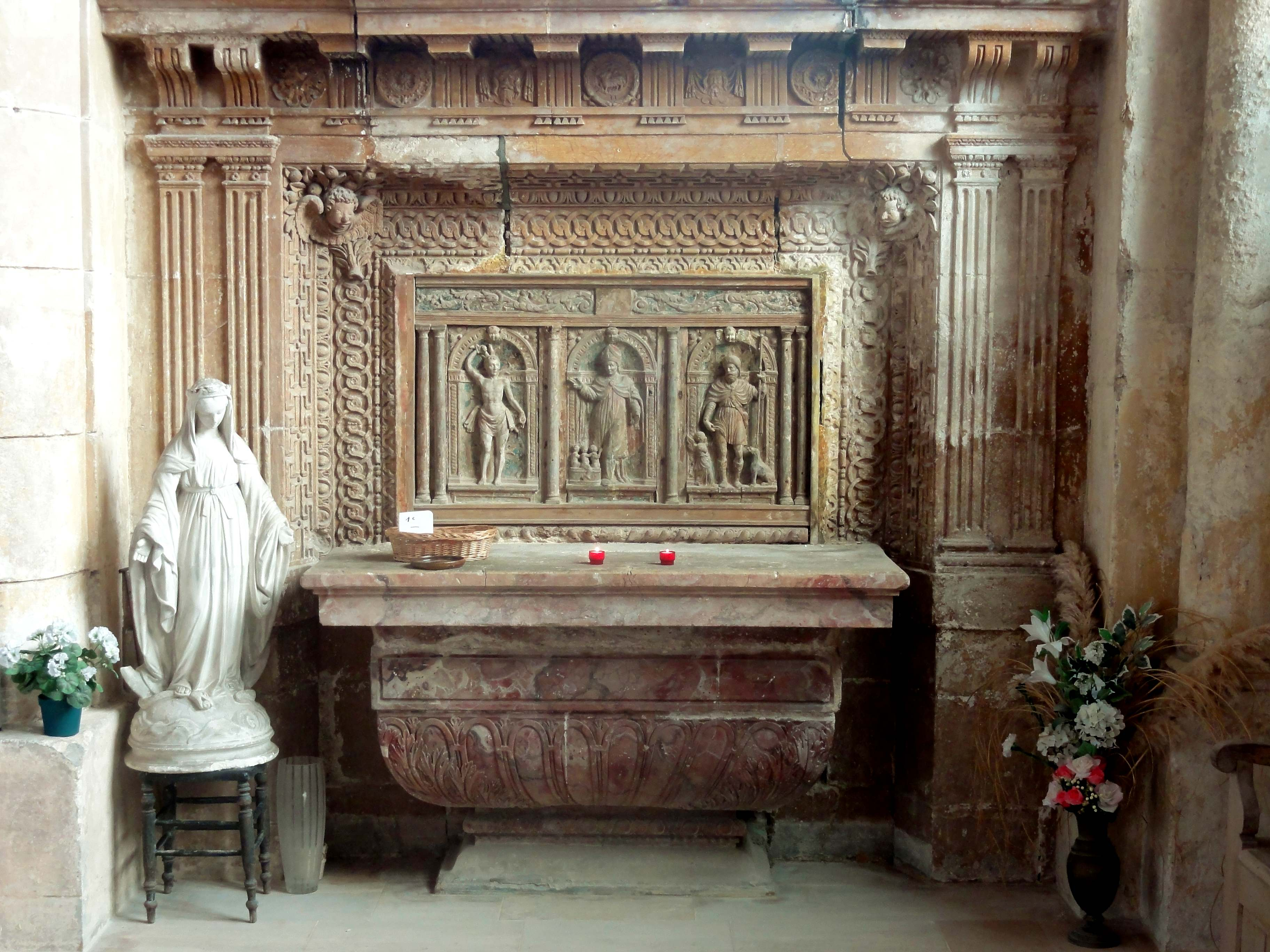 Retable de la chapelle de la Vierge.